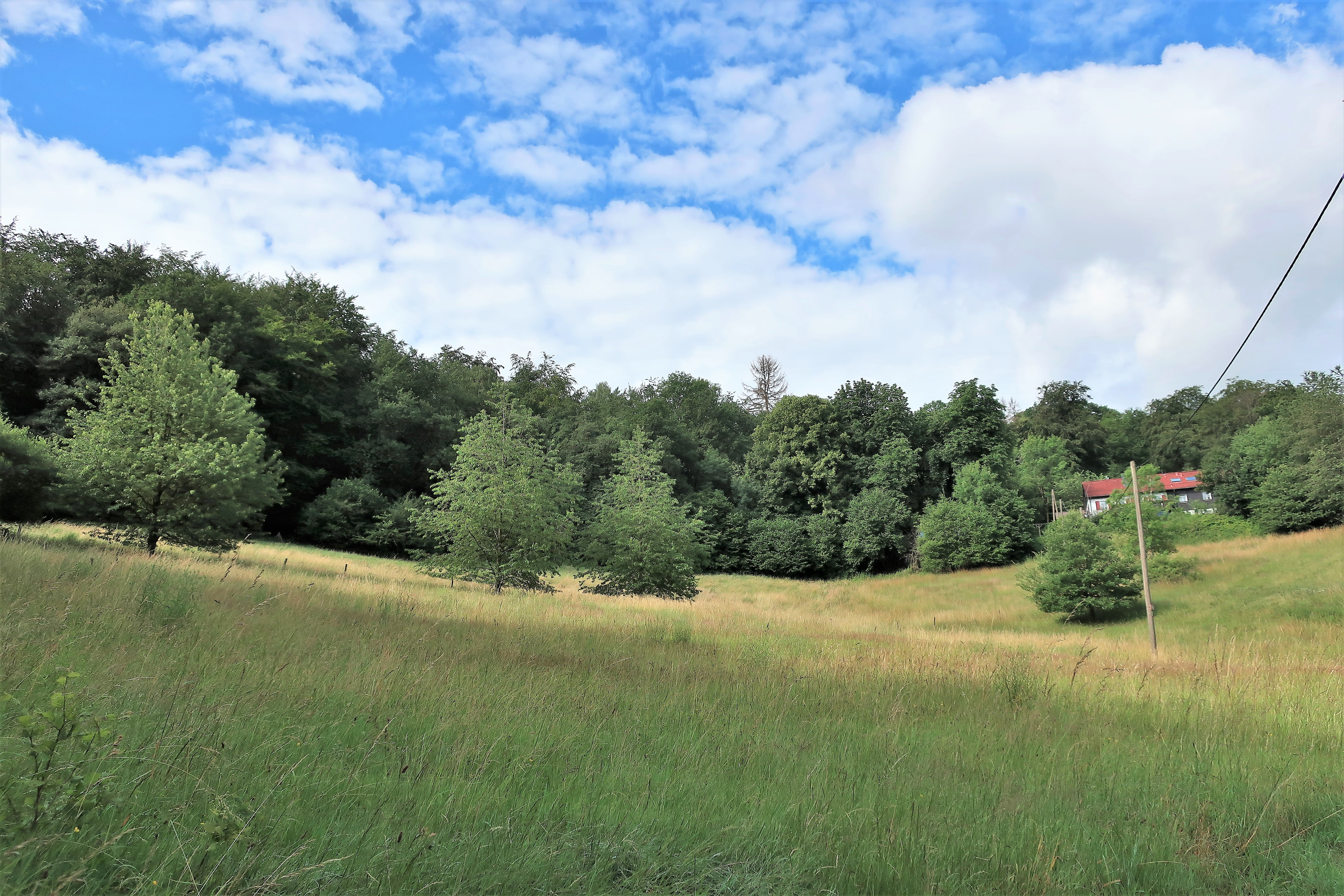 Geschützter Landschaftsbestandteil 1.4.2.56 „Feuchtwiese Buntebach“ in Hagen, südlich der Buntebachstraße. Es handelt sich um eine quellige Hangwiese. Foto rechts: Gold-Mountain-Ranch, Buntebachstraße 111.